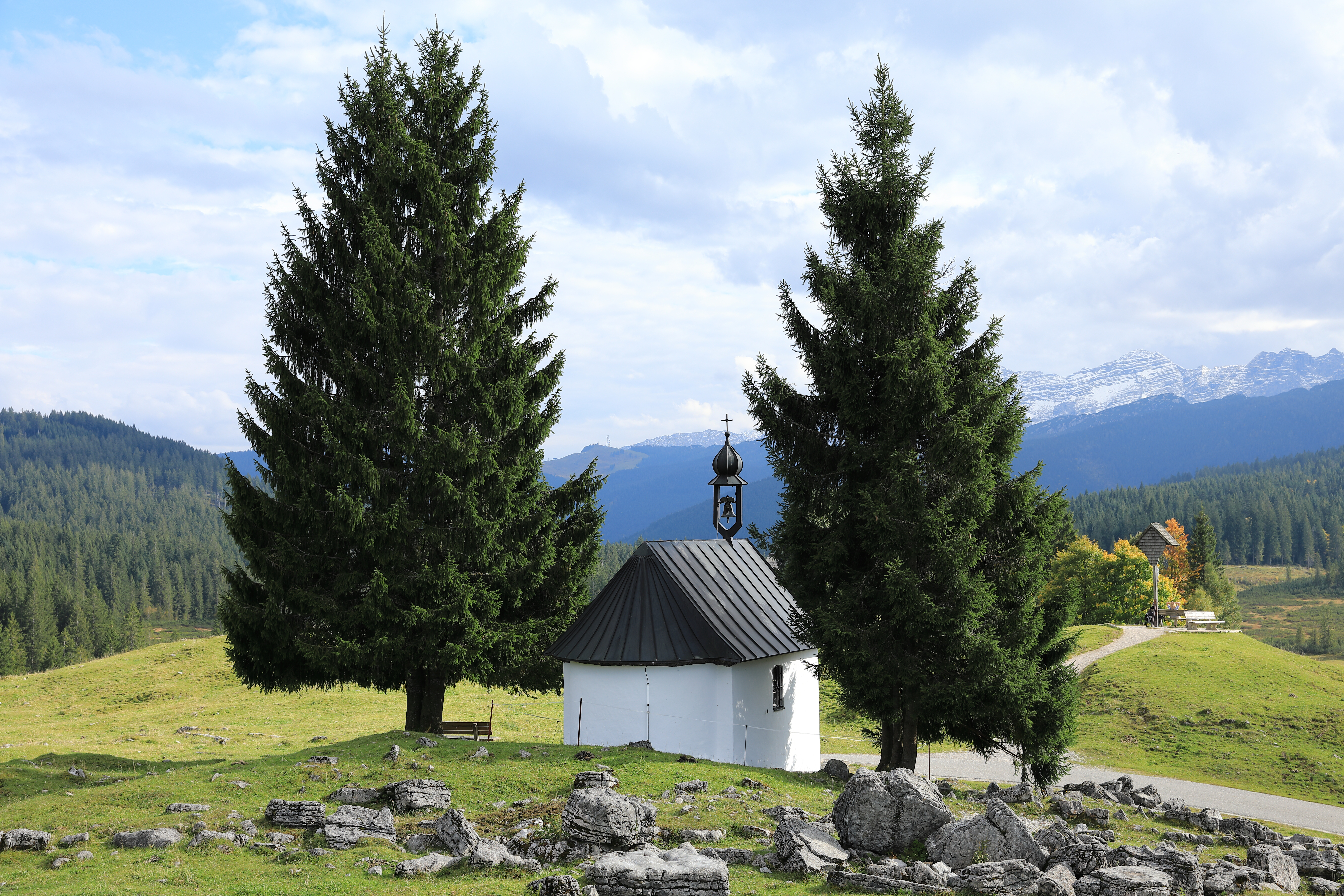 Almkapelle, gemauerter Satteldachbau, erbaut 1905This is a photograph of an architectural monument.